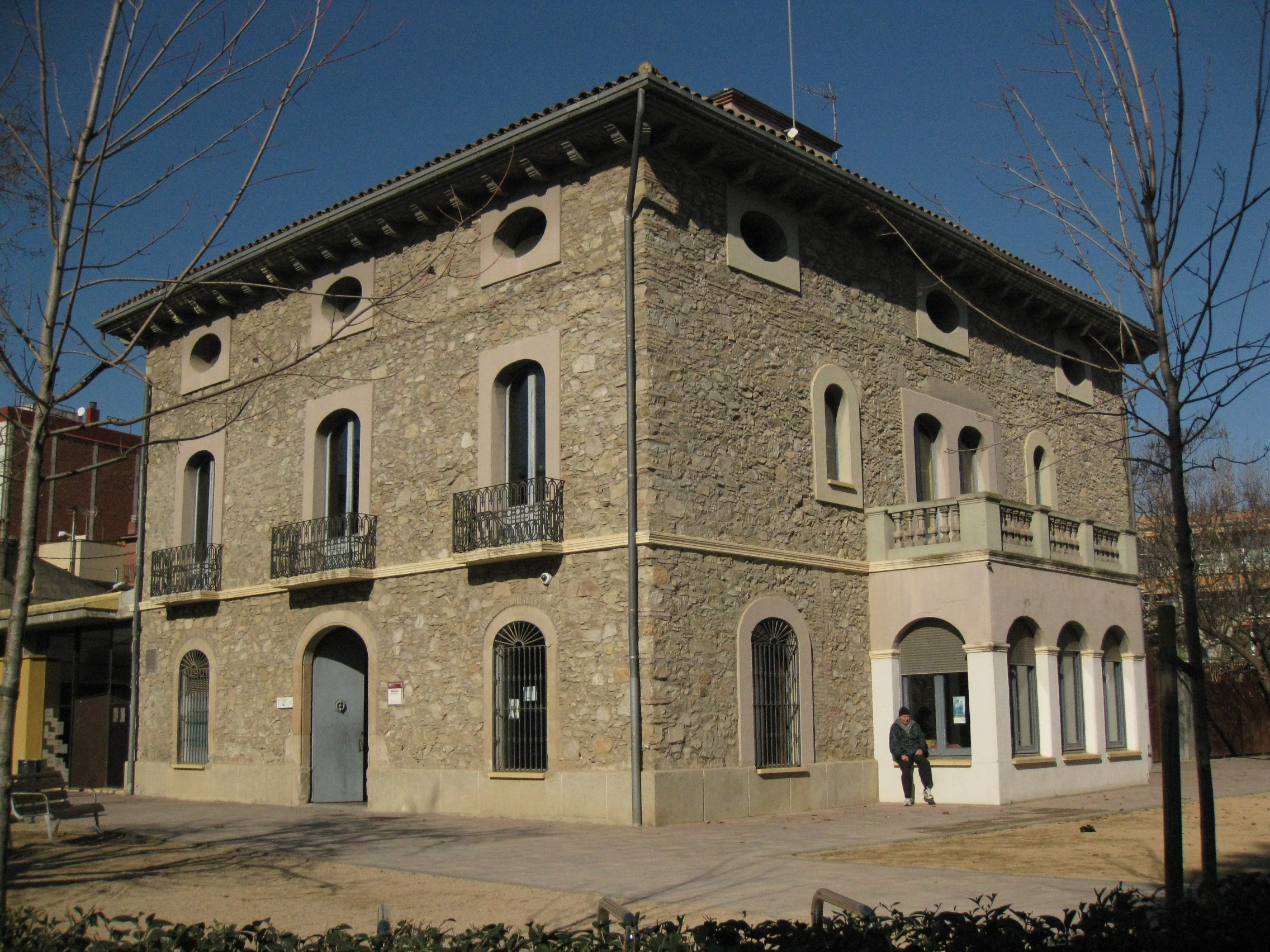 Casa Mulà (Mollet del Vallès)